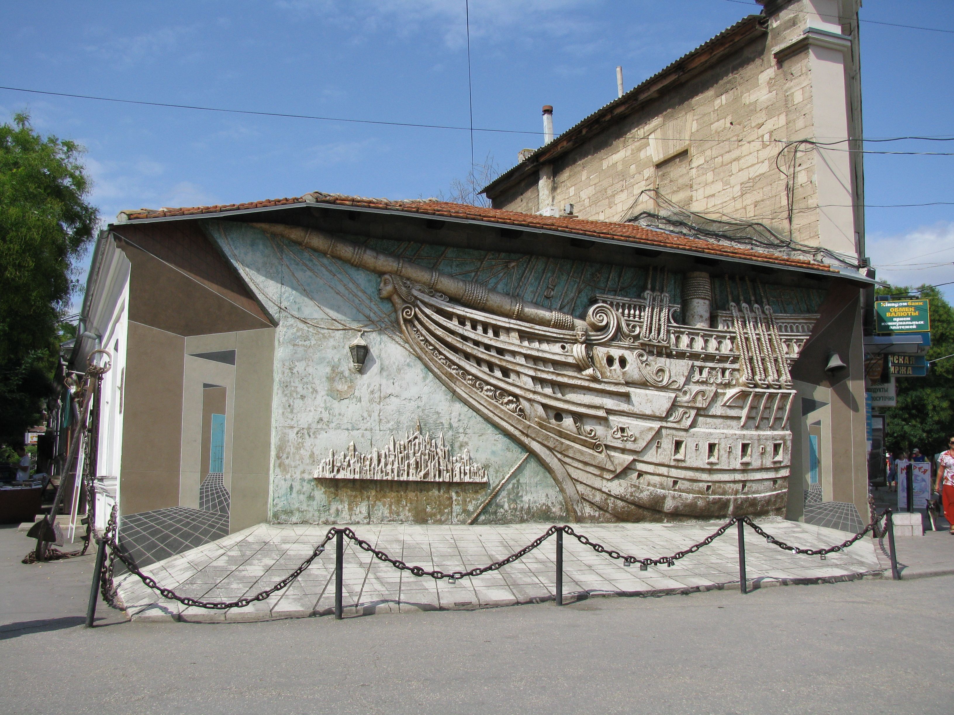 Будинок-музей О. С. Гріна, Феодосія, вул. Галерейна, 8–10, літ. А, А1, Б